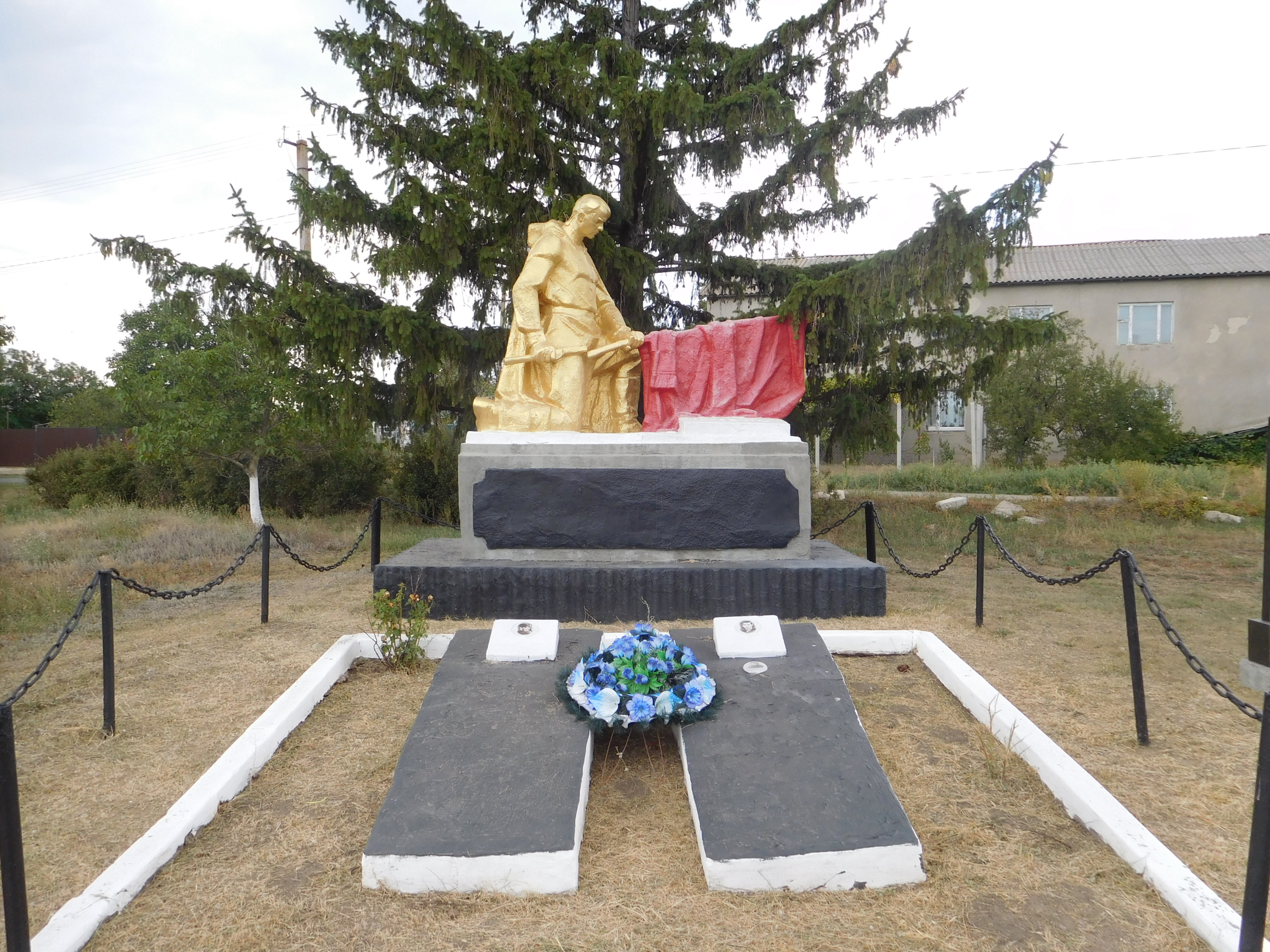 Військовий меморіал у с. Марківка, Роздільнянський район, Одеська Область. Вікіекспедиція Північ Одещини